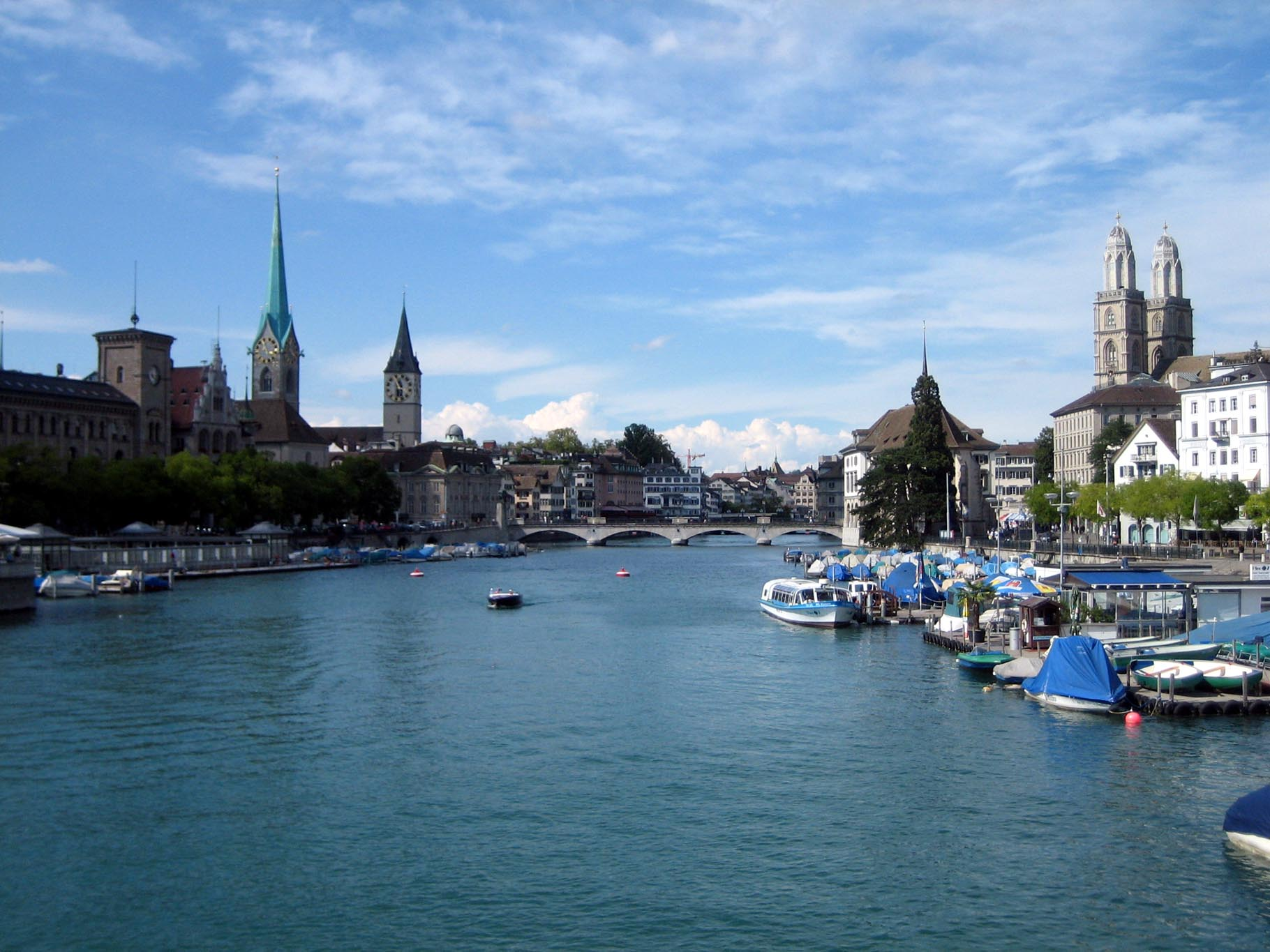 Limmat in Zürich von der Quaibrücke aus